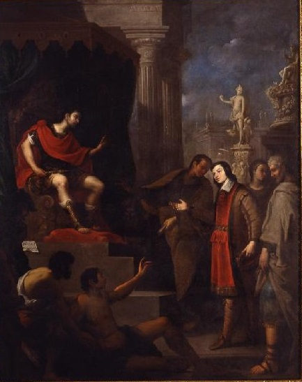 La obra representa a San Pantaleón curando a un enfermo ante el emperador Maximiano.